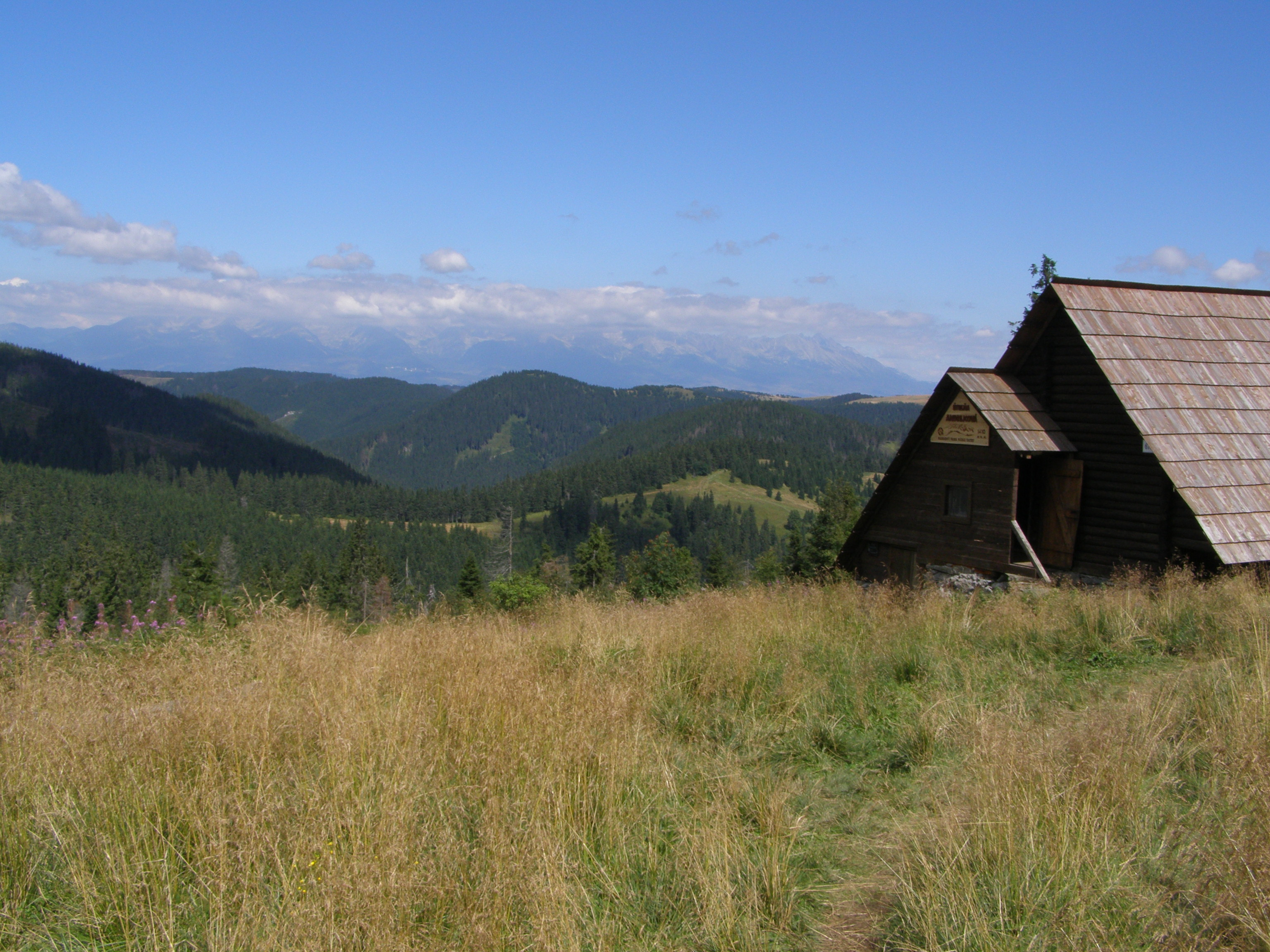 Nízké Tatry, Kráľovohoľské Tatry, výhled od útulny Andrejcová (1410 m) na západním úbočí vrcholu Andrejcová (1520 m) na sever